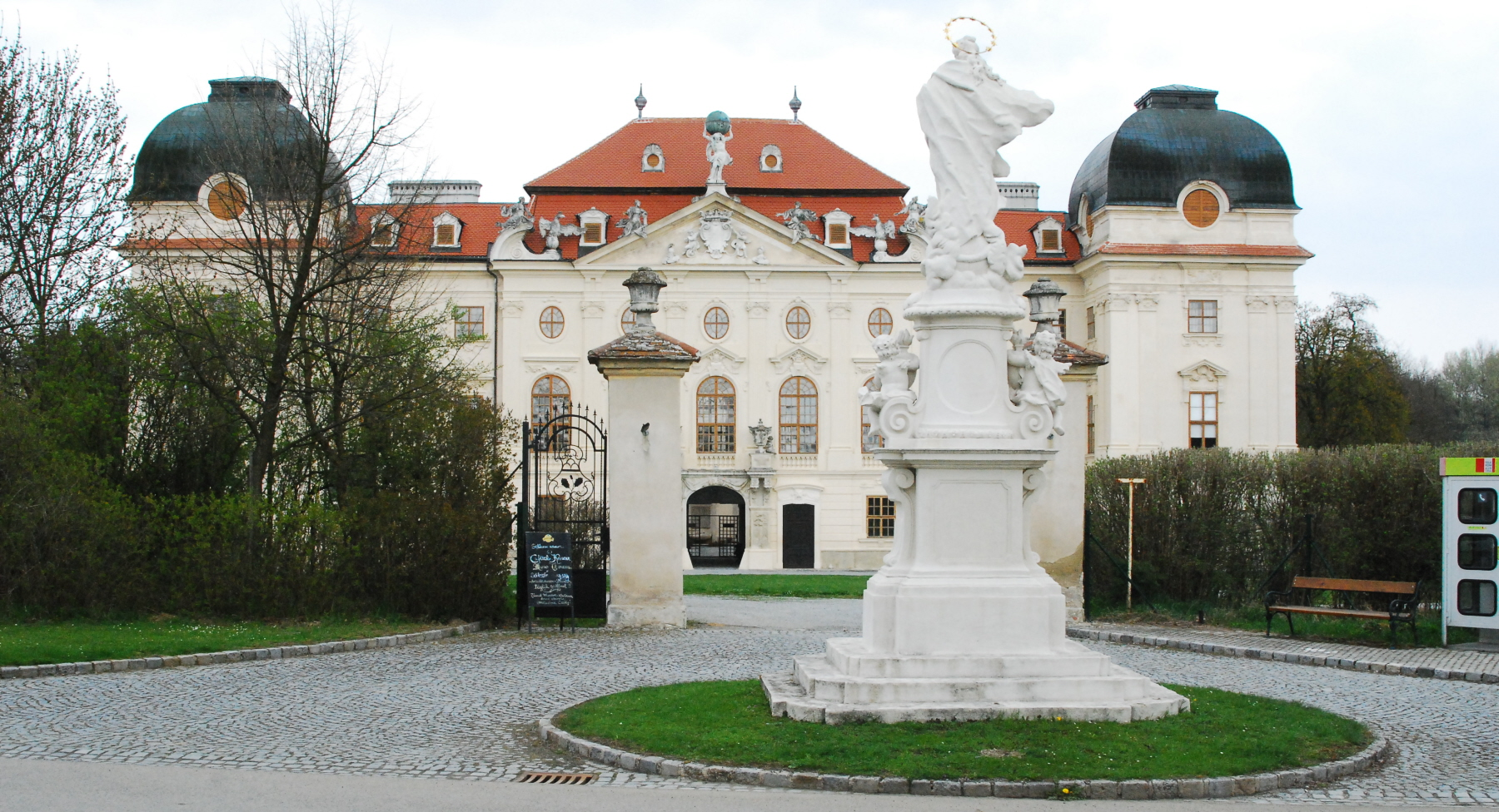 Mariensäule und Schloss Riegersburg in Riegersburg in Niederösterreich